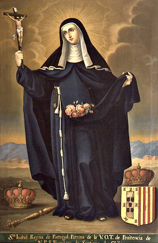 Santa Isabel Reina de Portugal